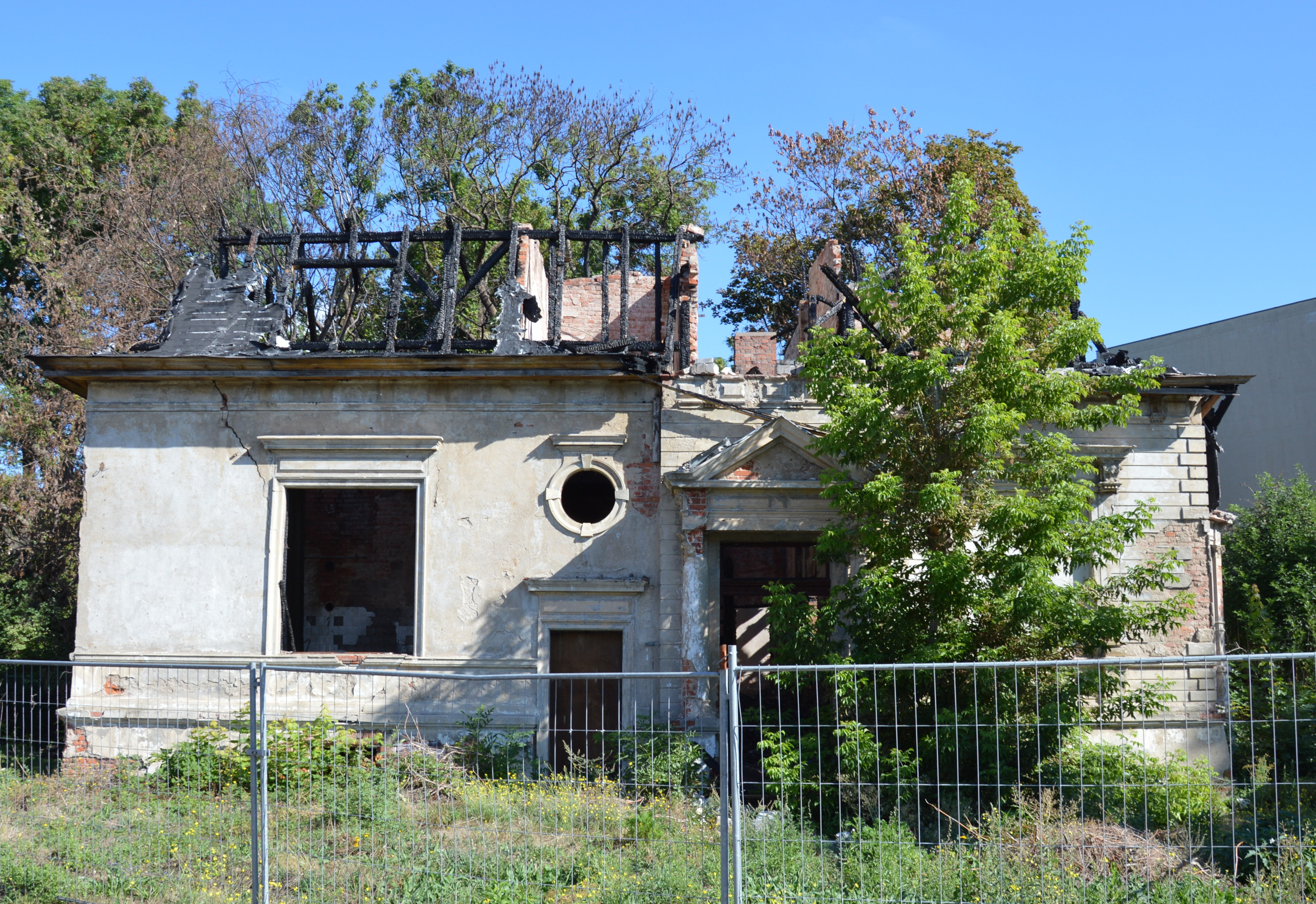 Haus Salzmannstraße 28 in Magdeburg